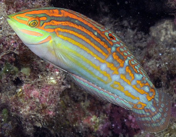 Un labre décoré (Halichoeres cosmetus) à la Réunion.